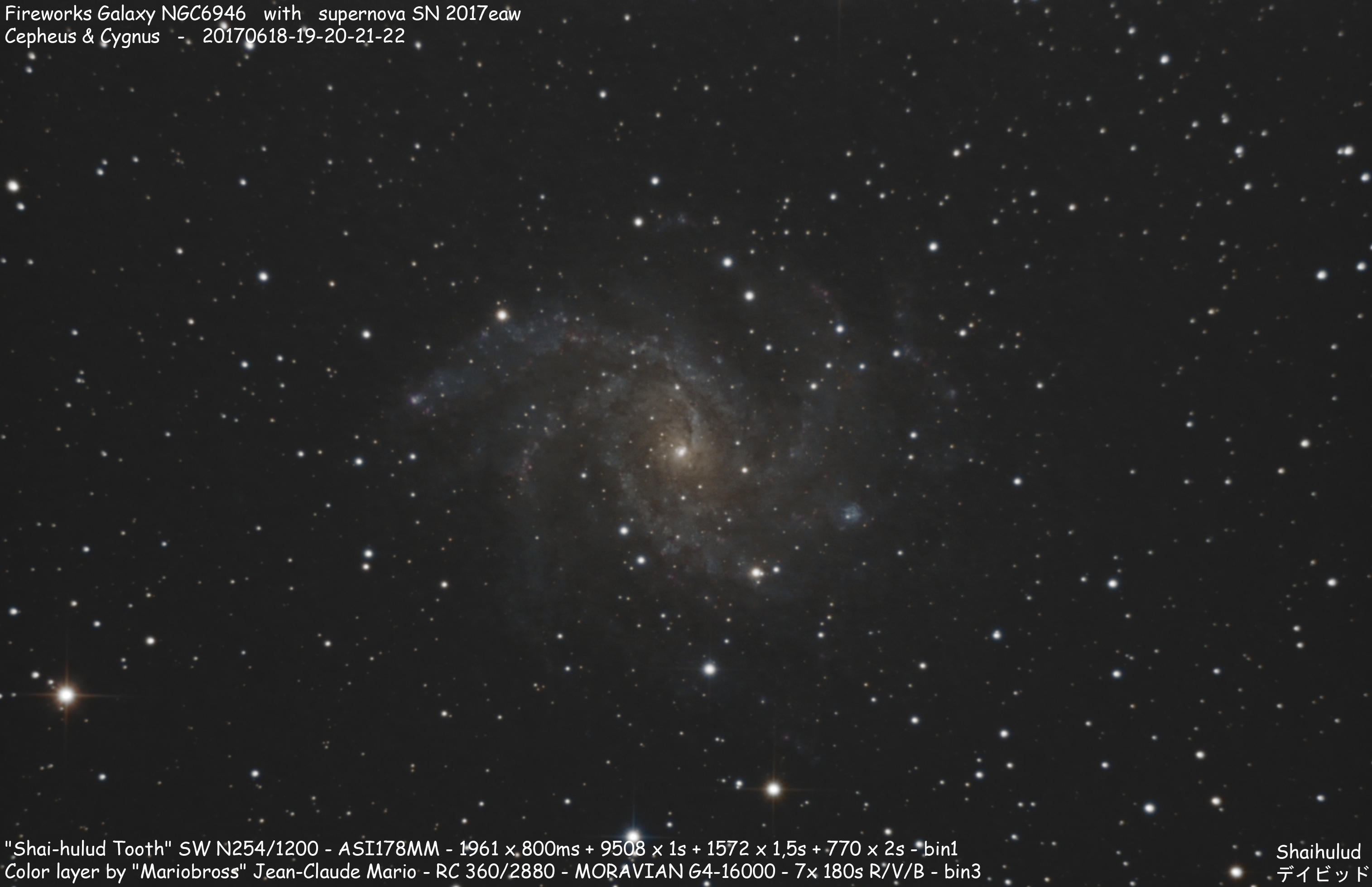 "Fireworks Galaxy" NGC6946